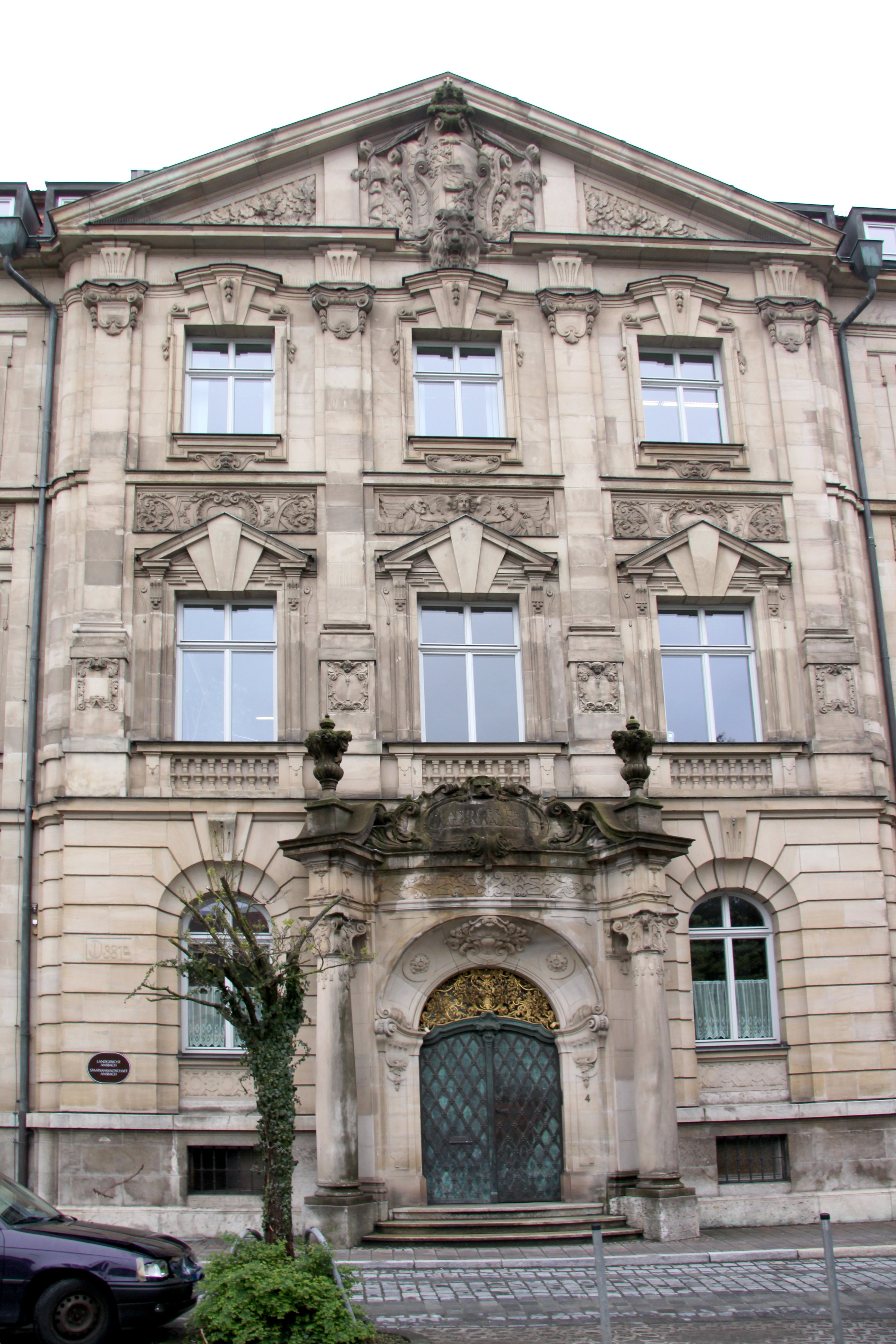 Landgericht Ansbach, Promenade, Staatsanwaltschaft Ansbach